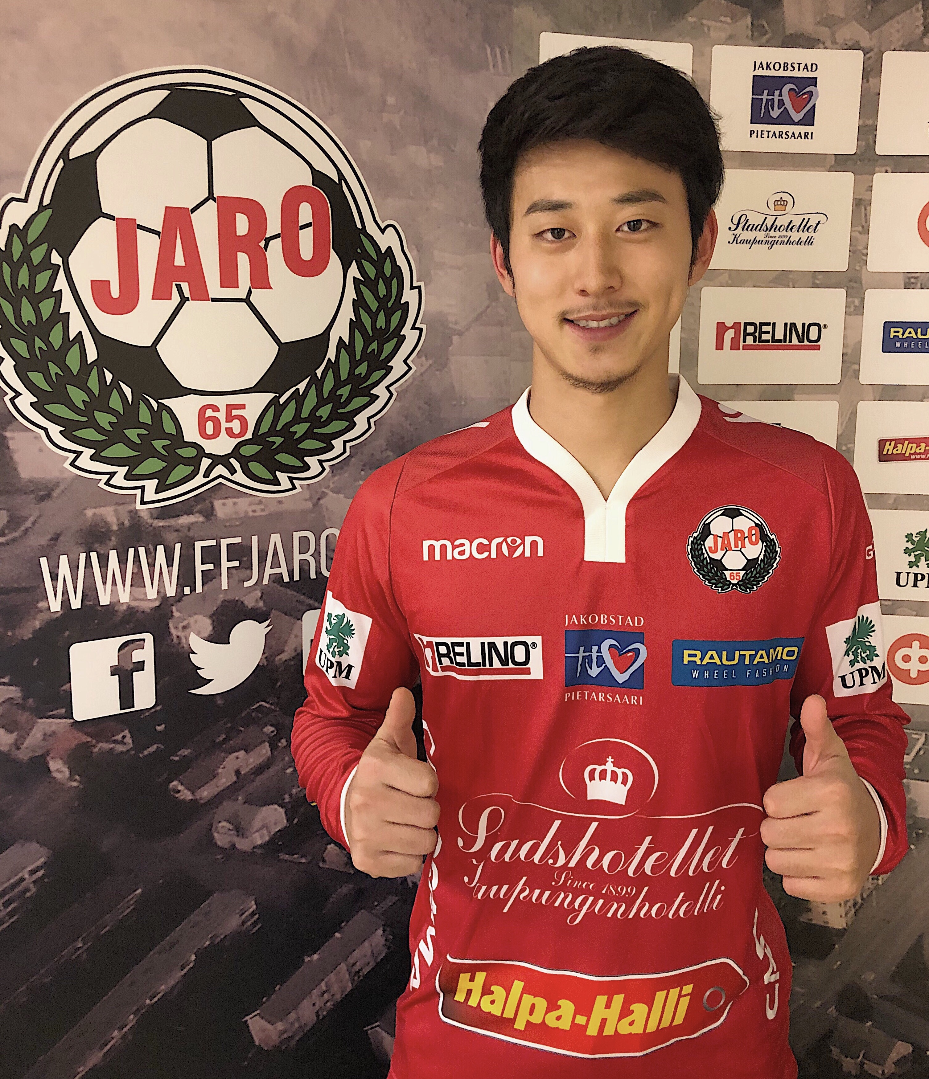 FFヤロでの高橋一輝